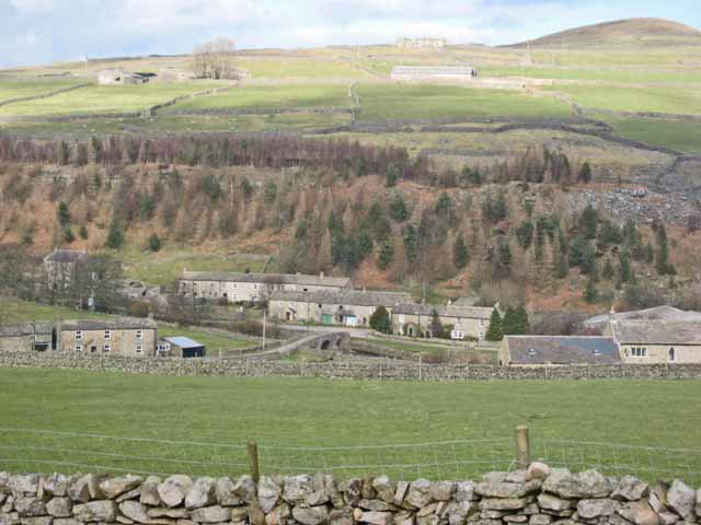 Whaw